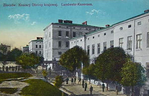 k.k. Landwehr Kaserne in Zloczow